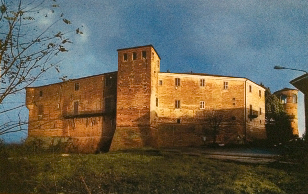 Immagine del Castello di Maranzana in provincia di Asti